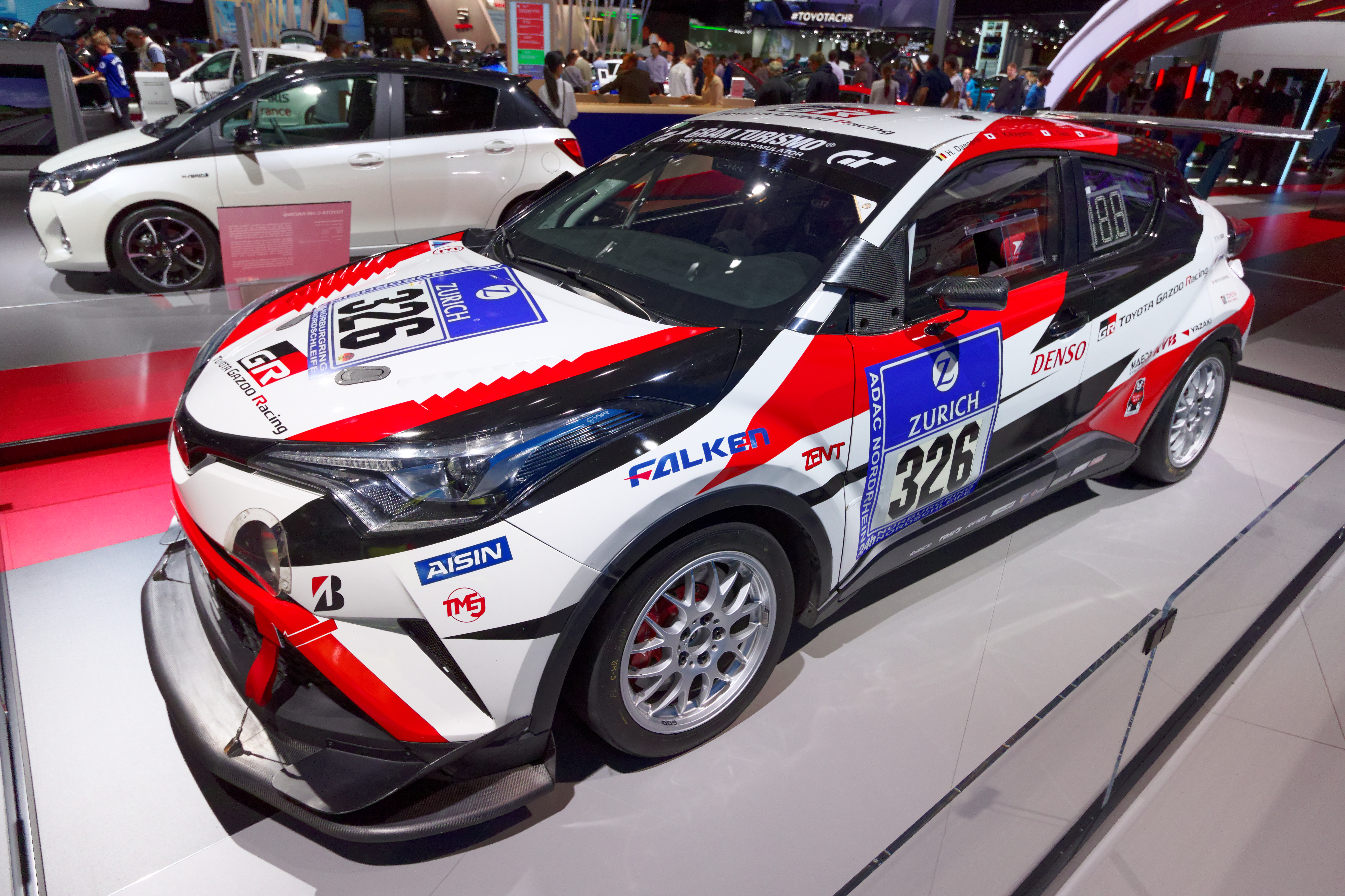 Une Toyota C-HR Racing présentée lors du mondial de l'automobile de Paris 2016.